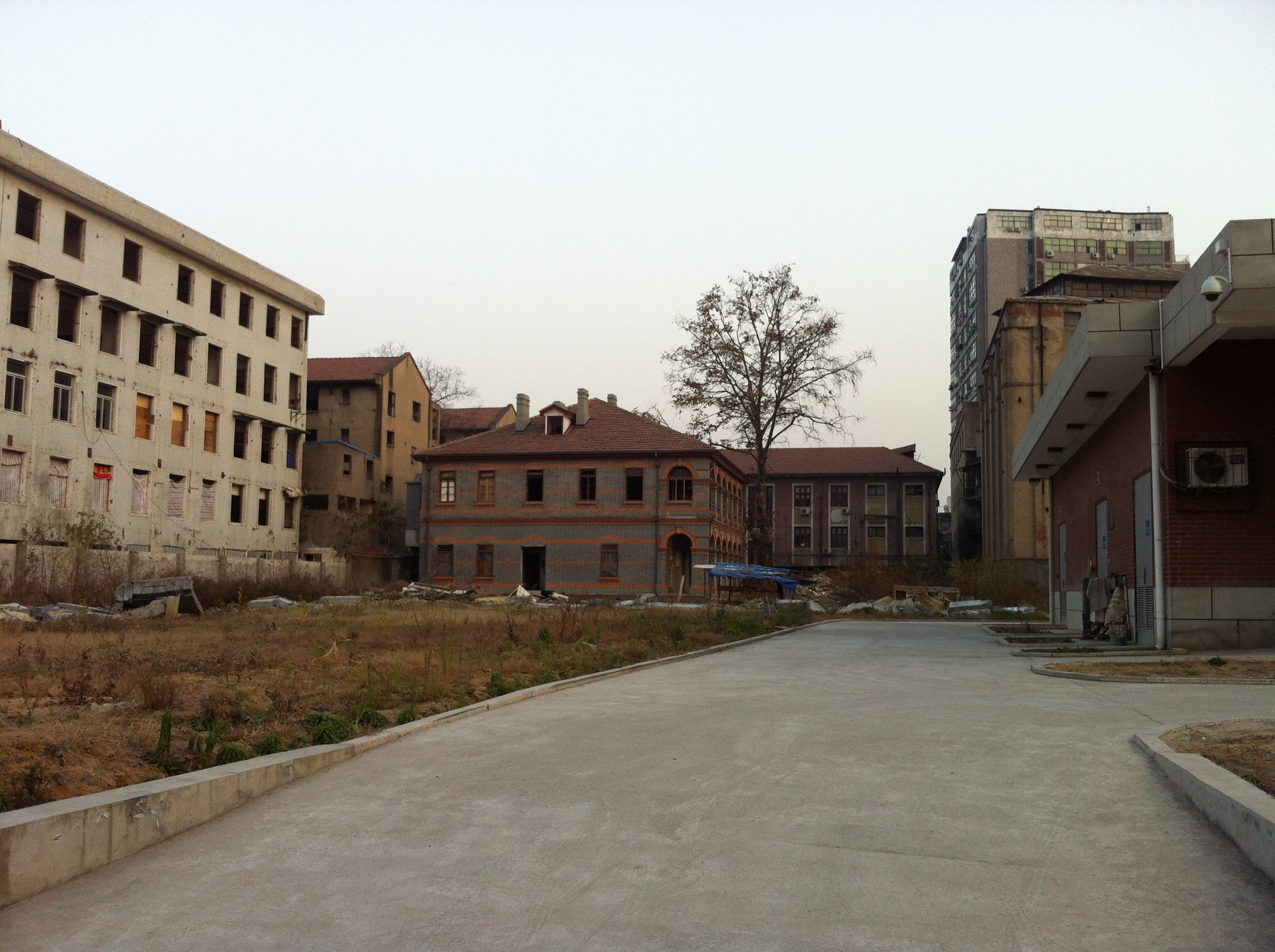 鲁兹故居，鄱阳街32号